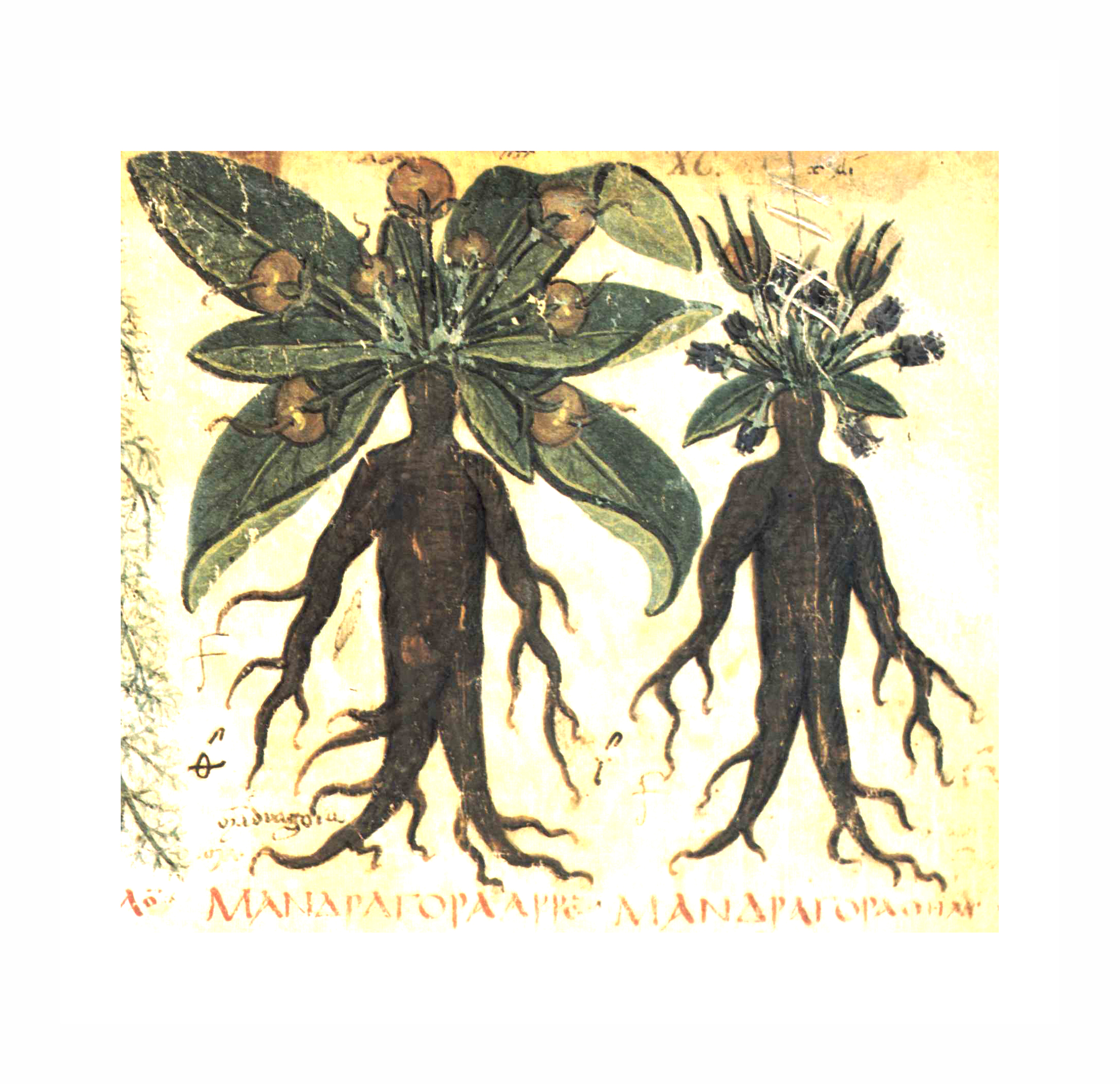 Mandragora